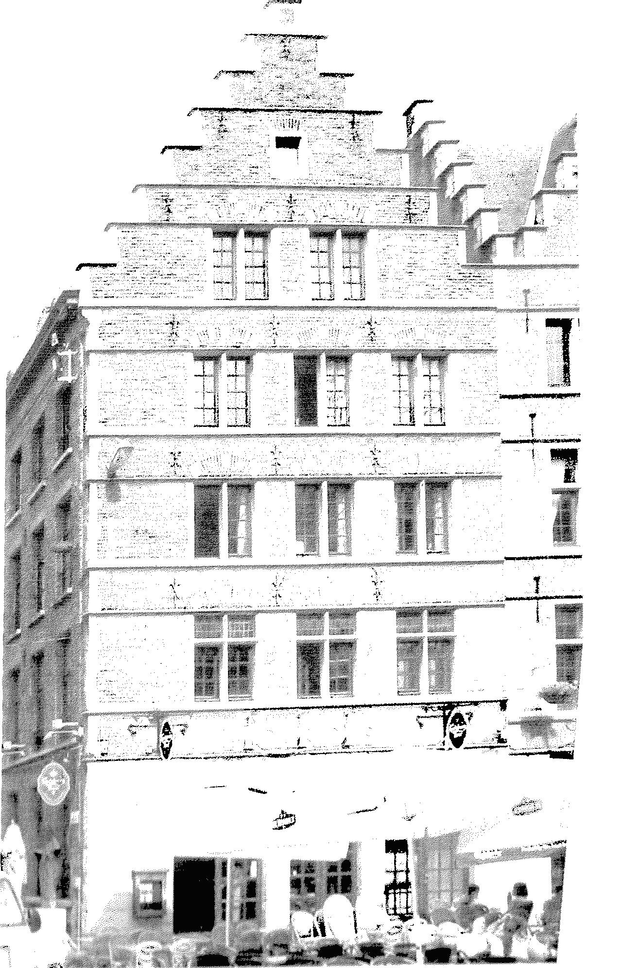 Hôtel Picardie à Gand, Place aux Foins